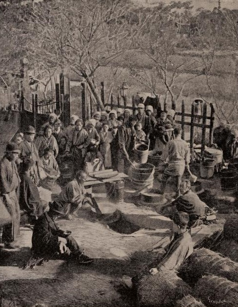 濃尾地震の避難所